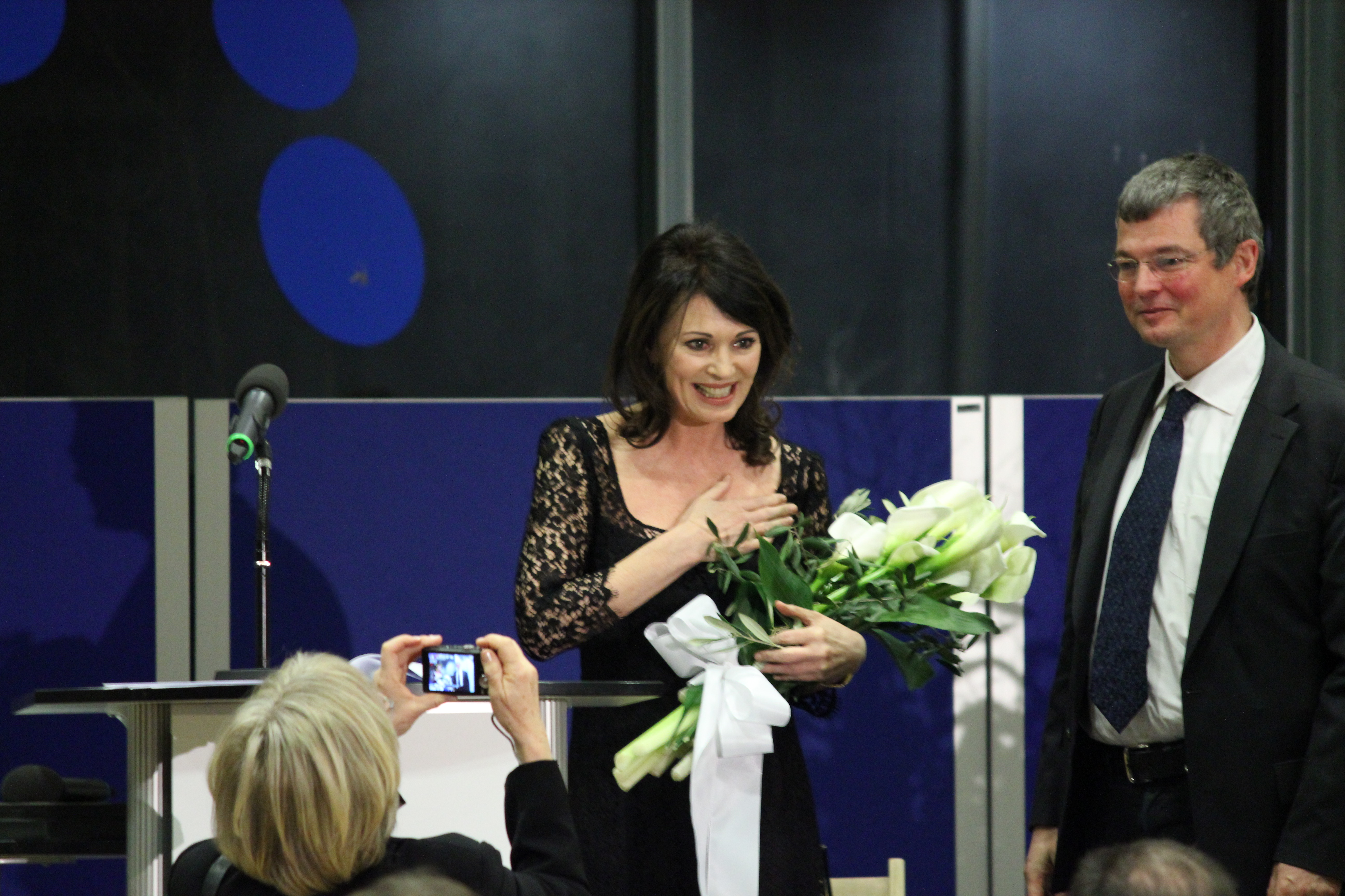 14. Februar 2013 - Verleihung des Theodor-Lessing-Preises an Iris Berben. Die Deutsch-Israelische-Gesellschaft Hannover e.V. verleiht den undotierten Preis an Iris Berben im Regionshaus Hannover. Iris Berben und Kay Schweigmann-Greve, Vorsitzender der Gesellschaft.